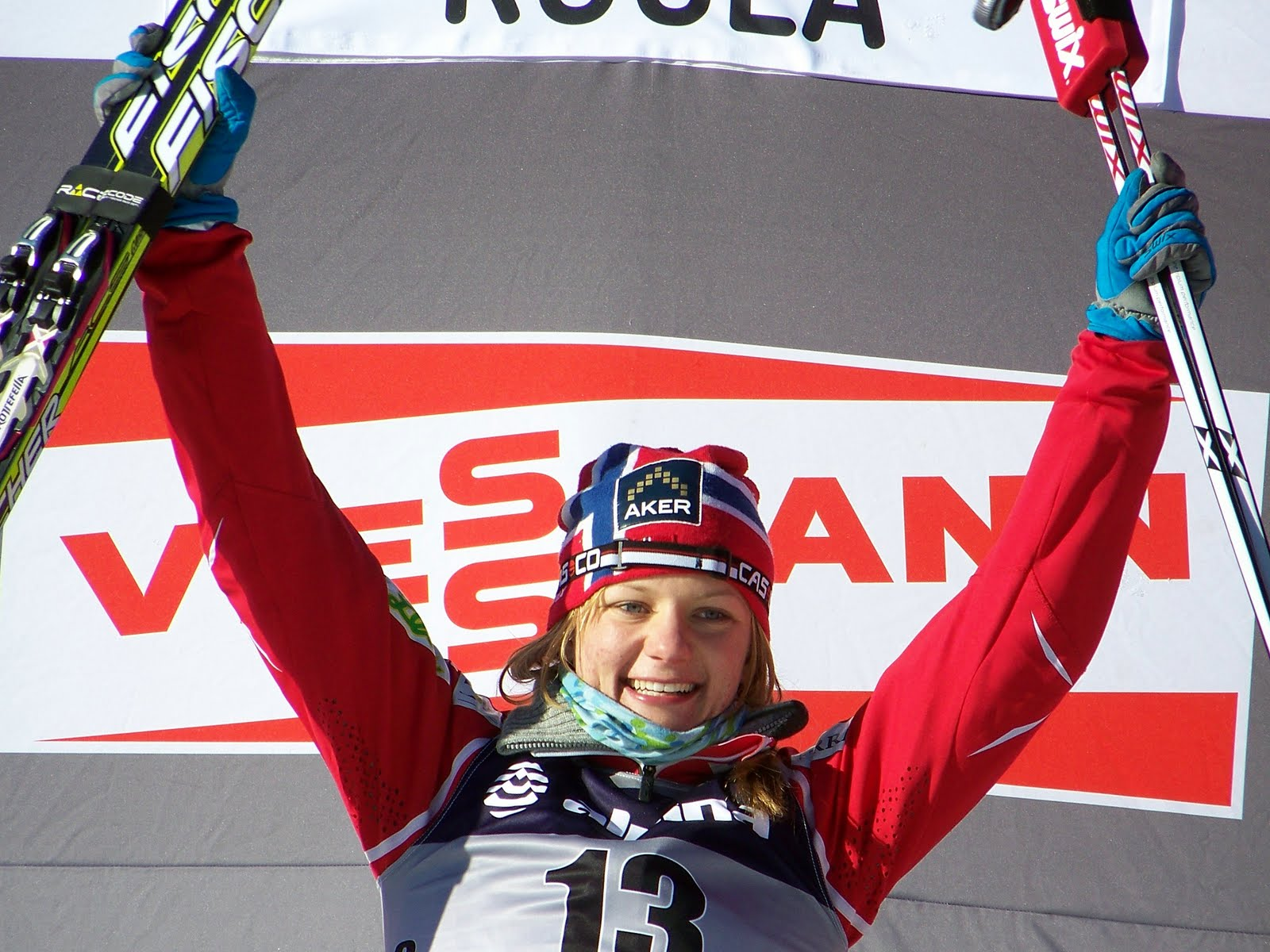 "kraljica Rogle 2011" Maiken Caspersen Falla